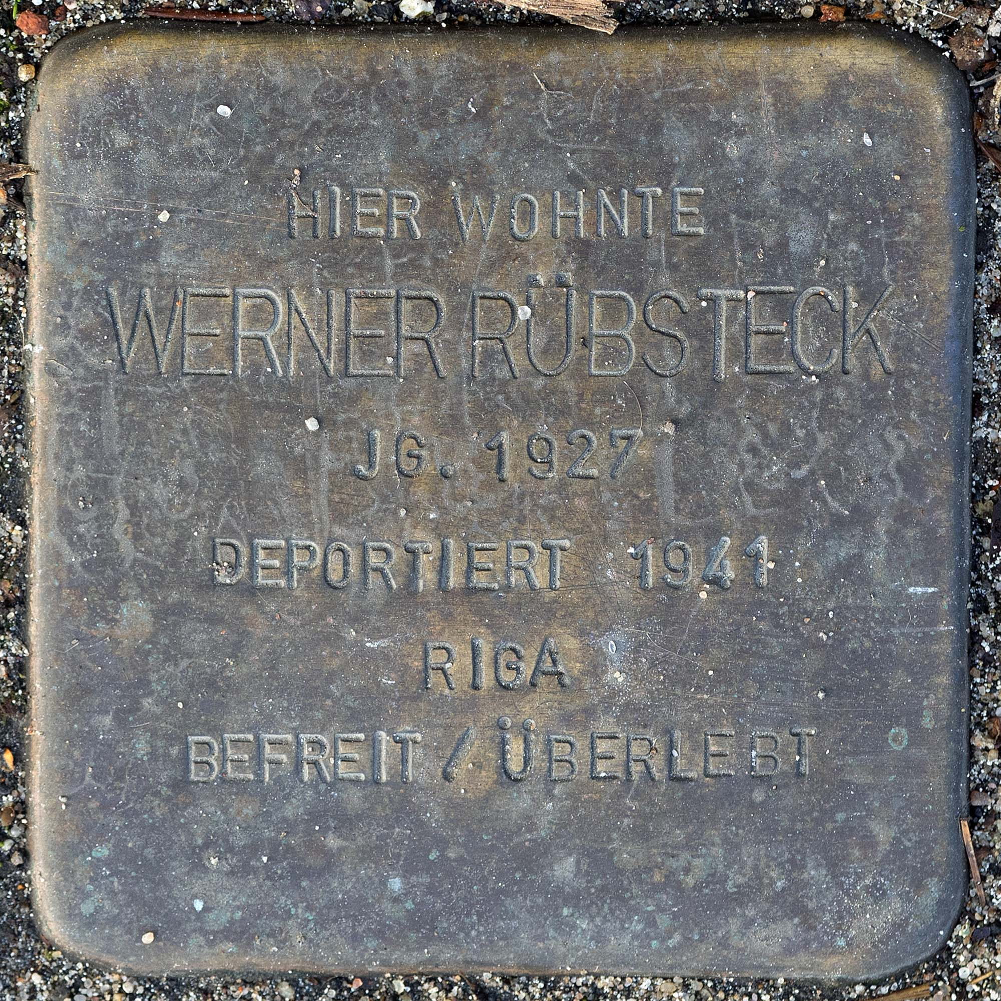 Stolperstein für Ruebsteck Werner